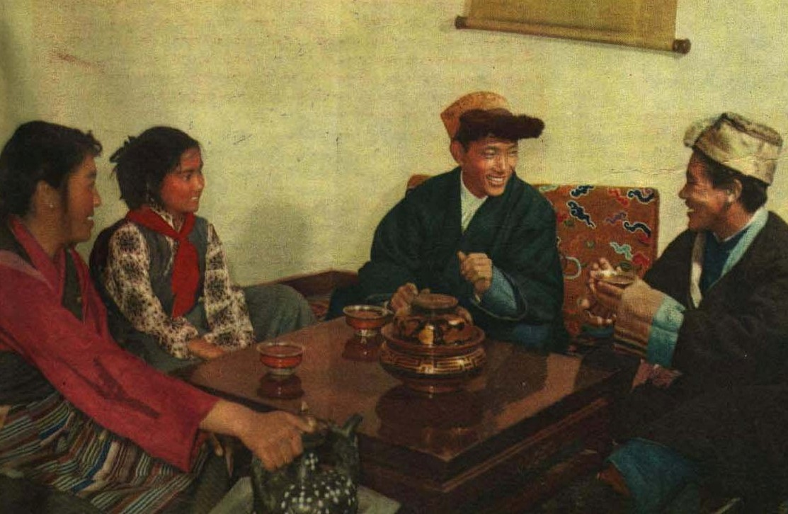 1962-04 1962年 藏族人喝酥油茶